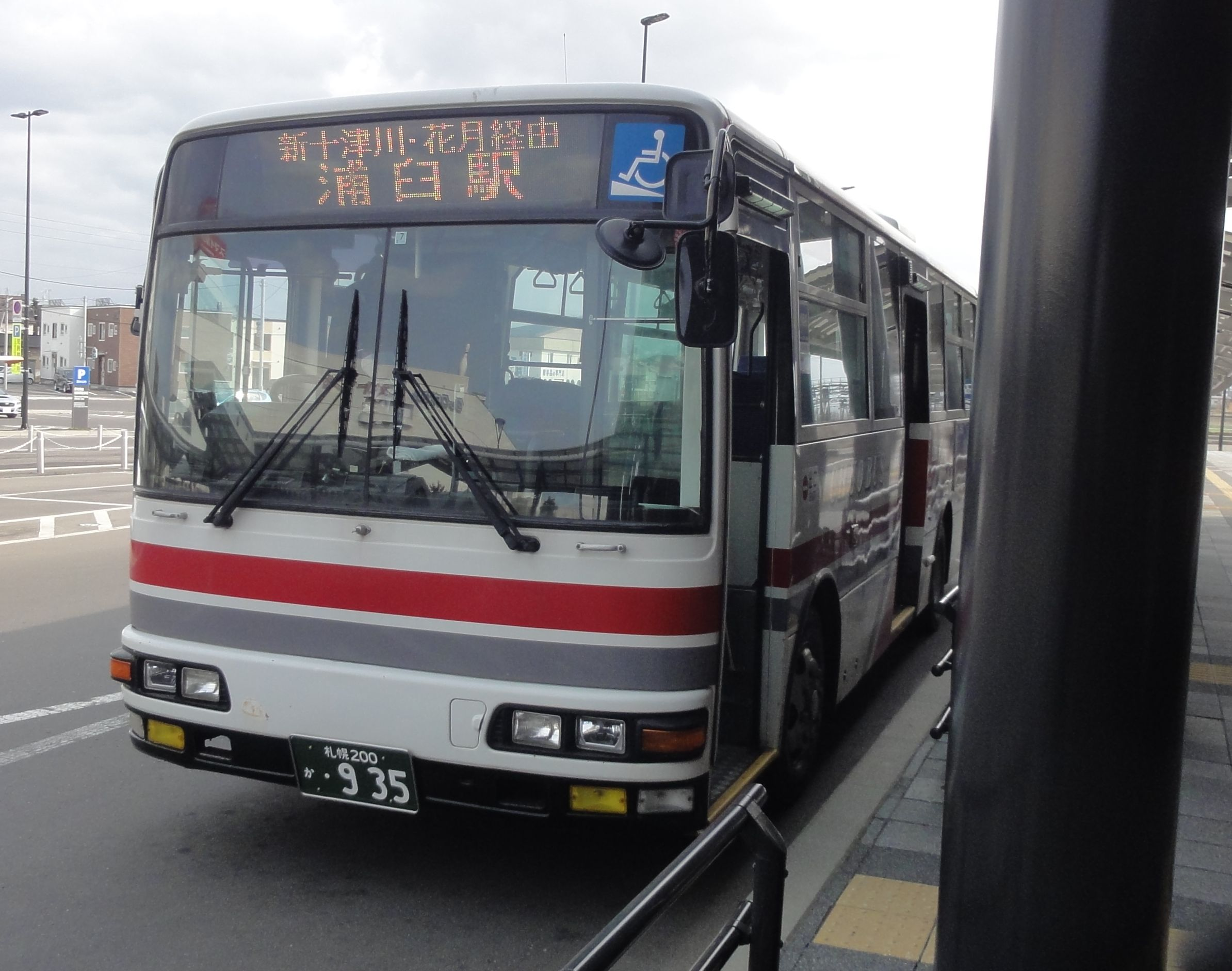 北海道中央バス 札幌200か935・滝川浦臼線 滝川駅前にて